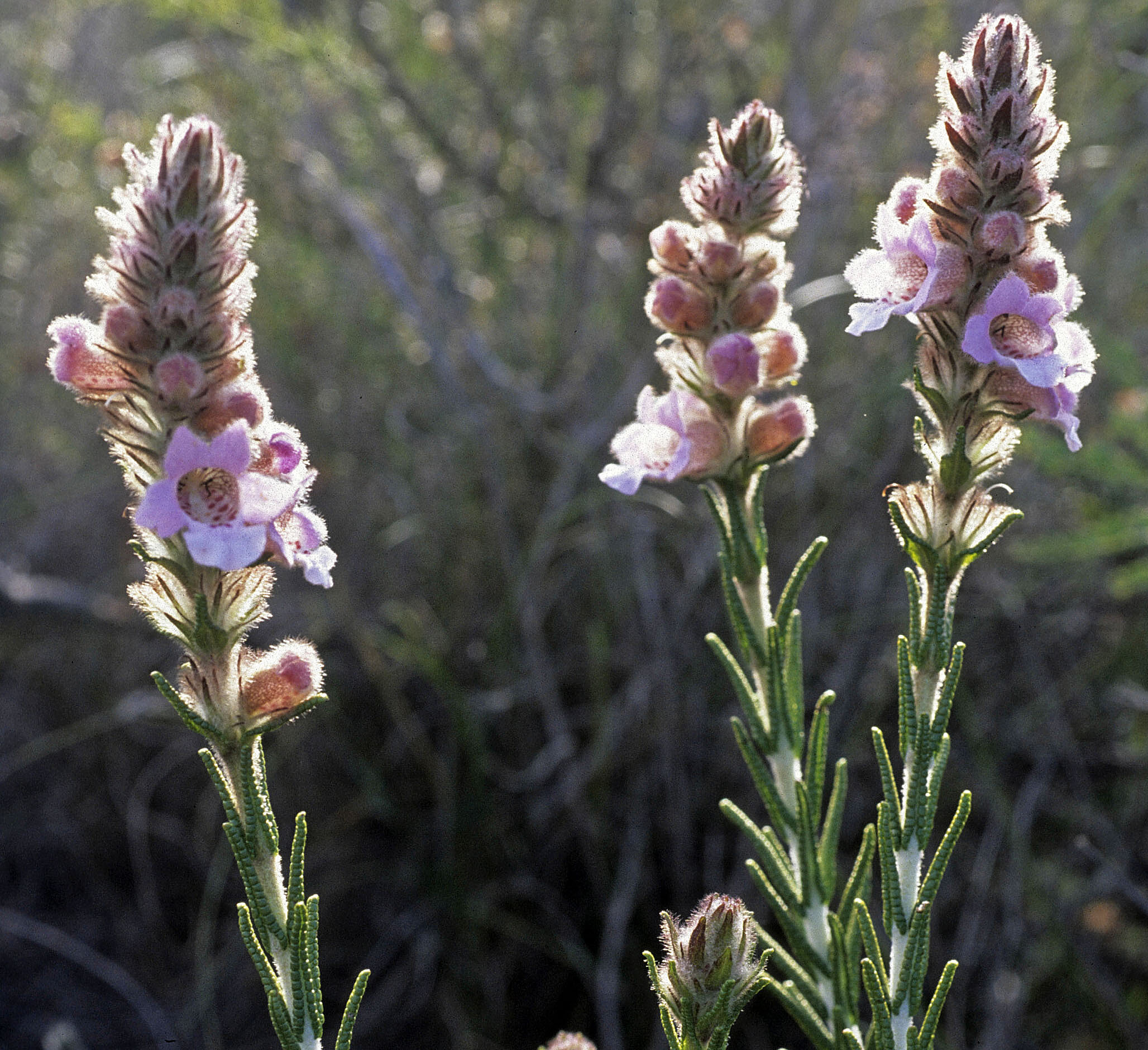 Hemiphora bartlingii en Munbinea Road, entre Cervantes y Jurien Bay, Western Australia.